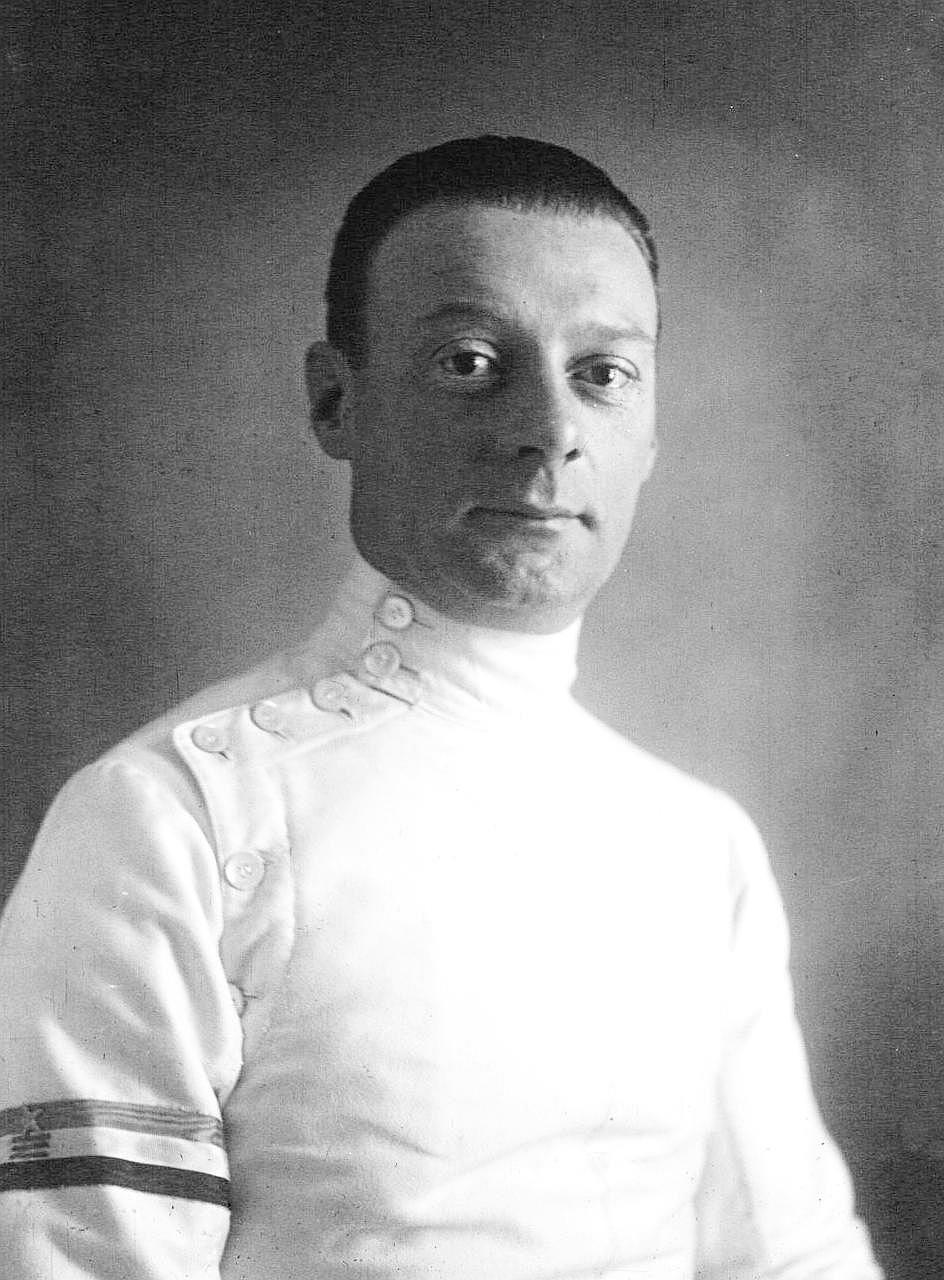 Lucien Gaudin, escrimeur, gros plan : [photographie de presse] / Agence Meurisse